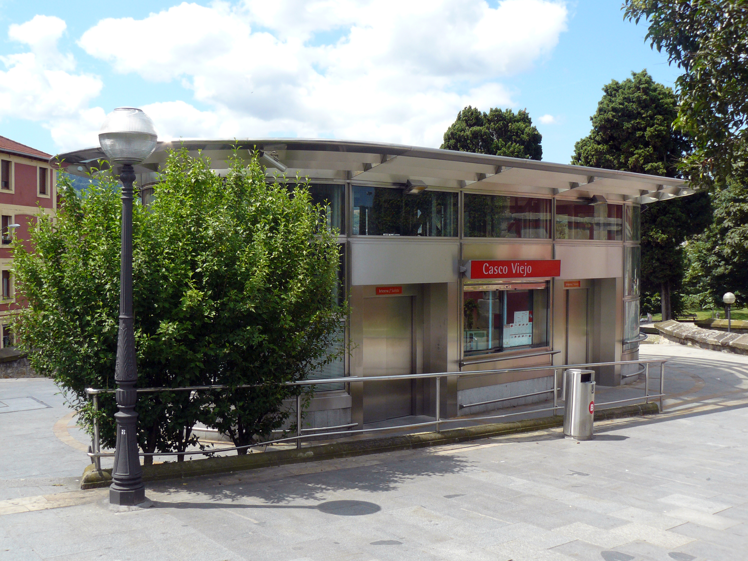 Salida al barrio de Begoña de la estación "Casco Viejo" del Metro de Bilbao.